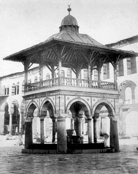 الموضأ في صحن الجامع الأموي دوماس 1870